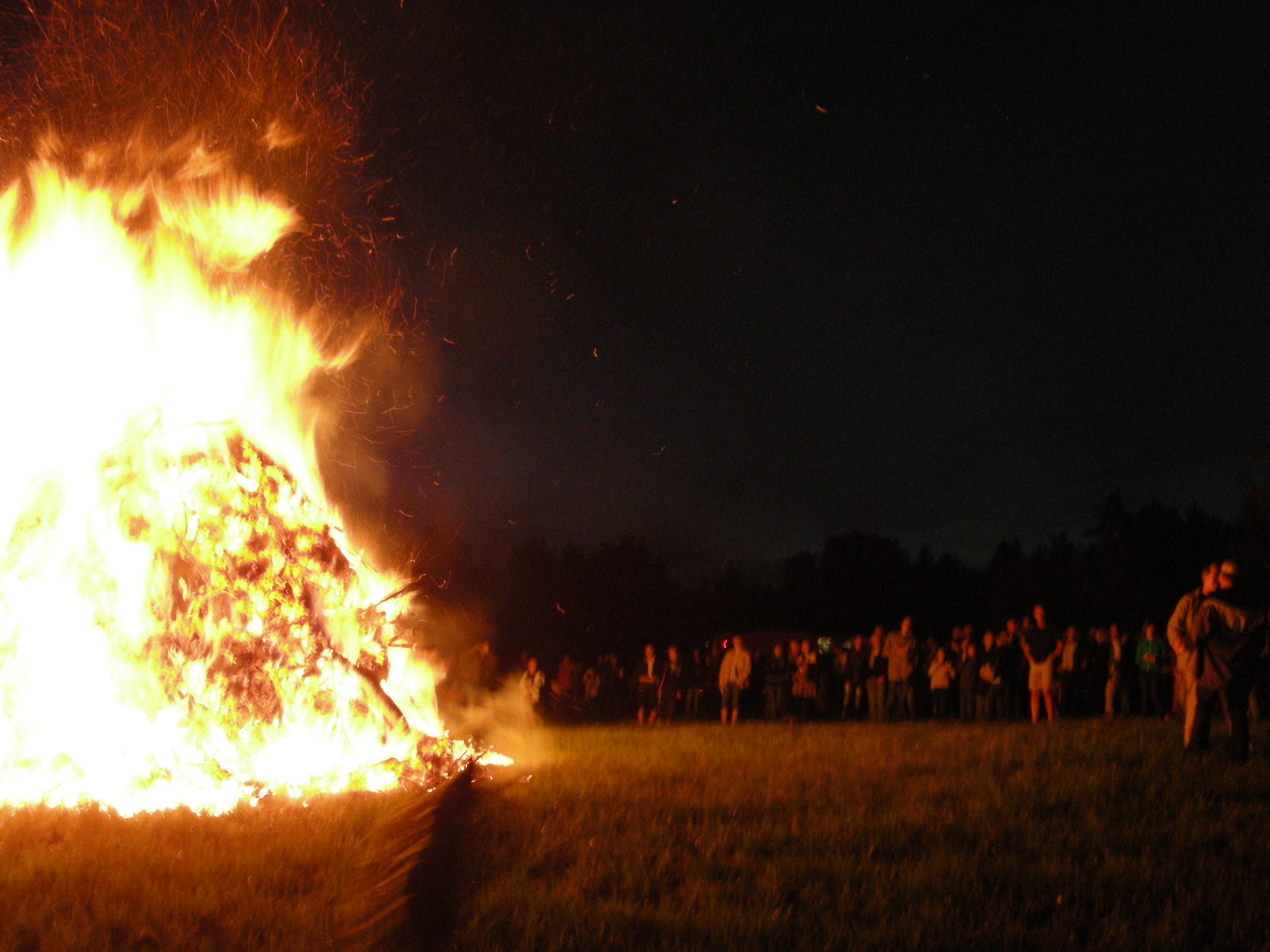 Osterfeuer am Stadtrand von Graz (2011)